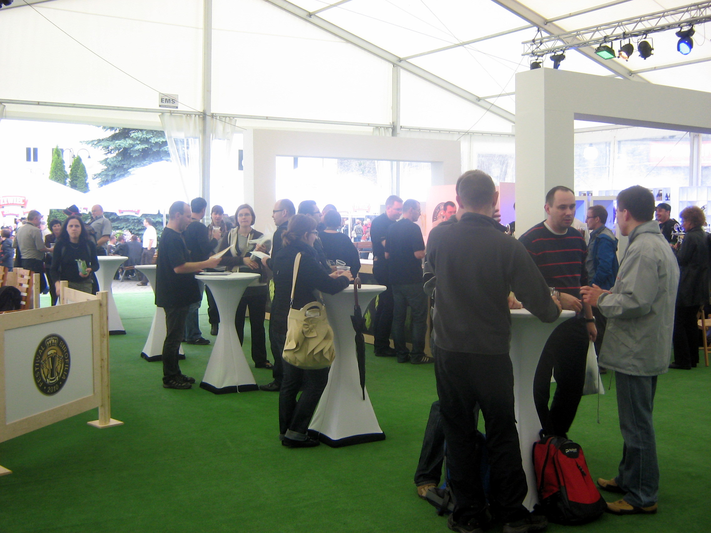 W pawilonie